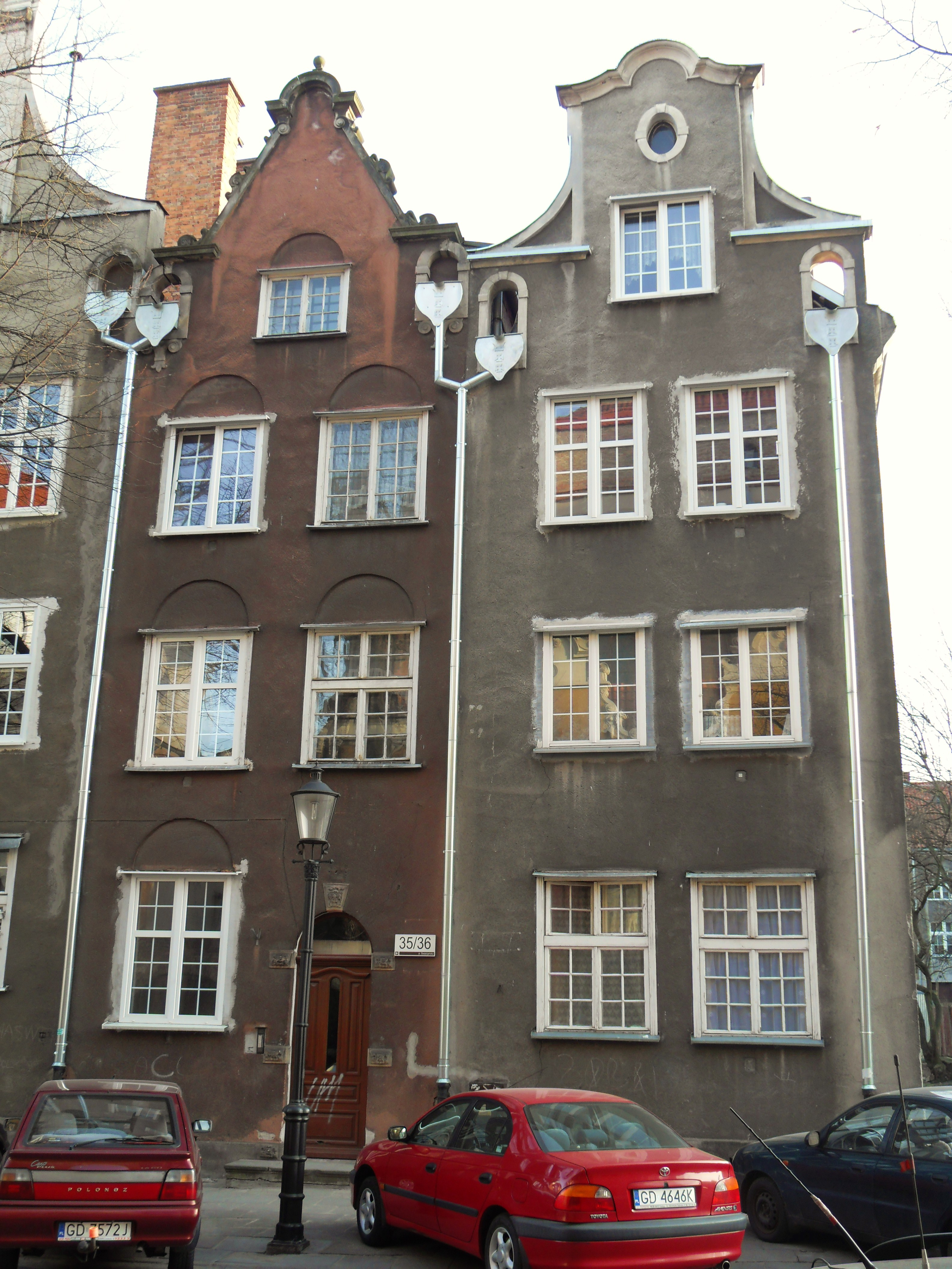 Gdańsk Główne Miasto, ul. Świętojańska 35/36 (z lewej zabytkowa kamienica nr 36 nr rejestr. 593).